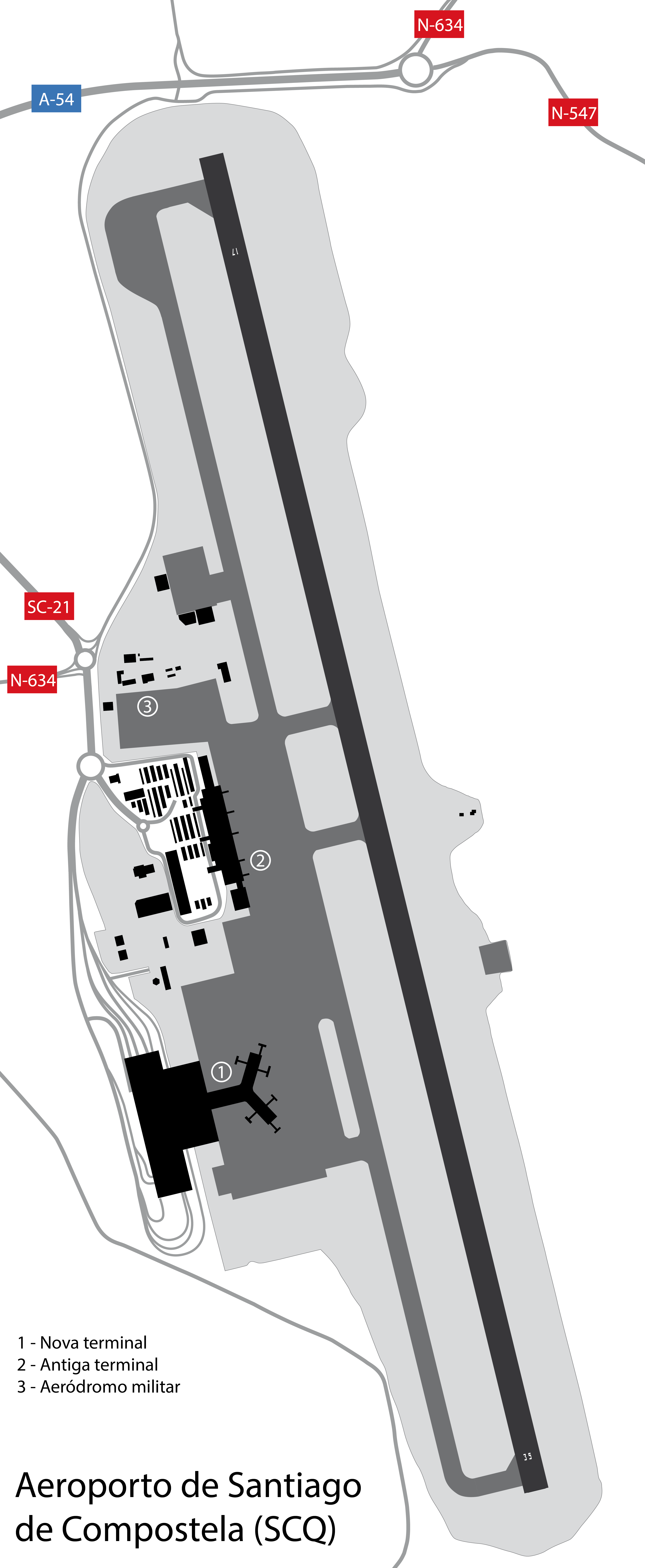 Diagrama do aeroporto de Santiago de Compostela.